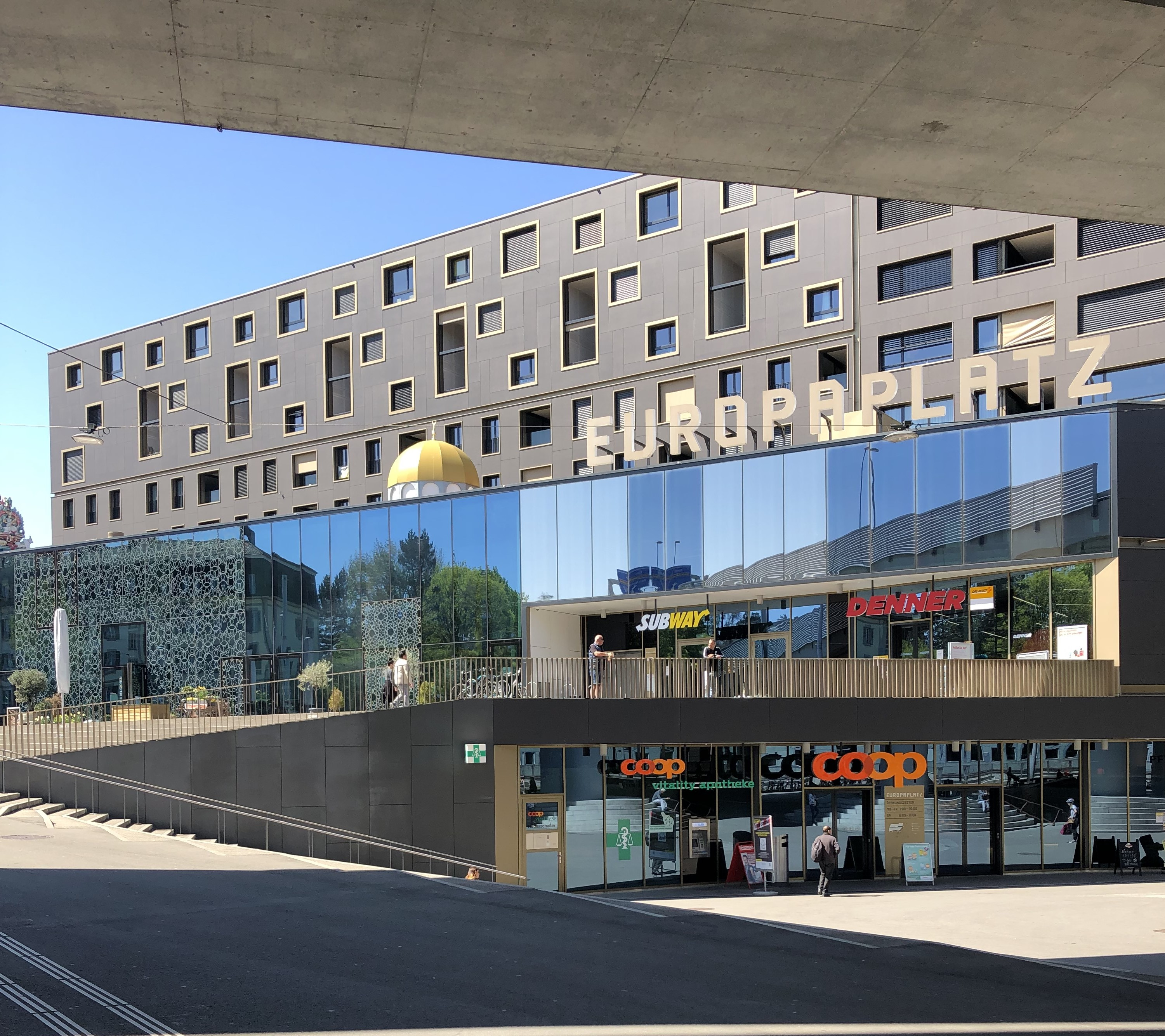 Haus der Religionen Europaplatz